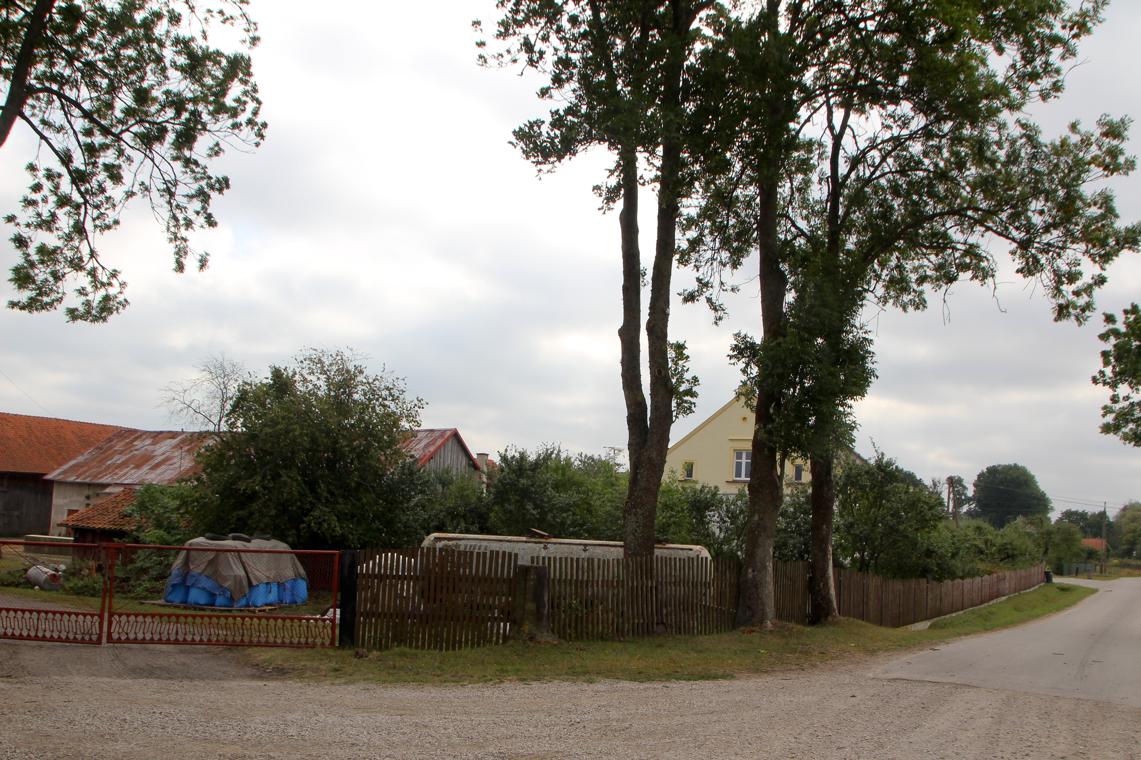 Momajny - wieś w Polsce położona w województwie warmińsko-mazurskim, w powiecie kętrzyńskim, w gminie Barciany.